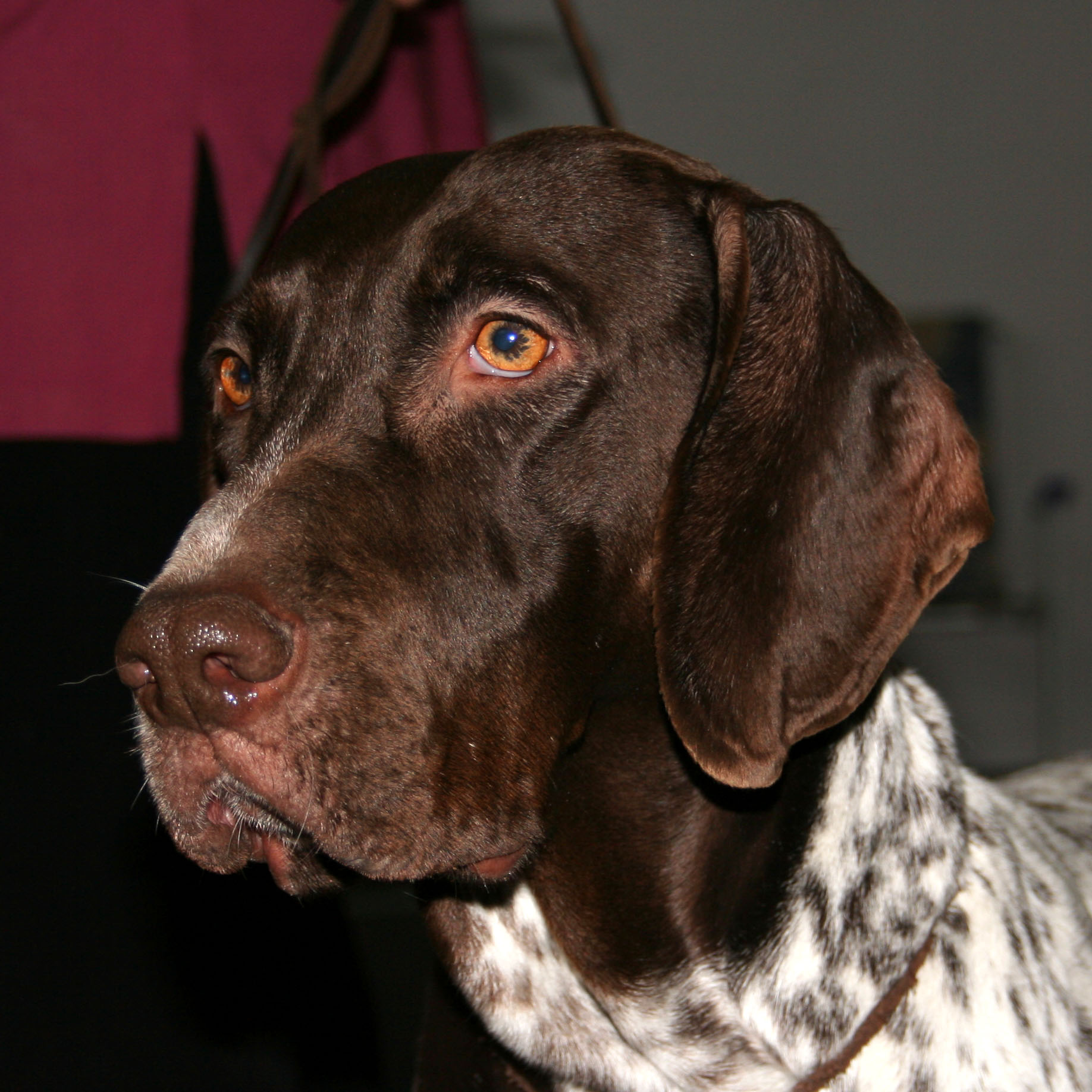 Wyżeł_duński na Światowej Wystawie Psów Rasowych w Poznaniu